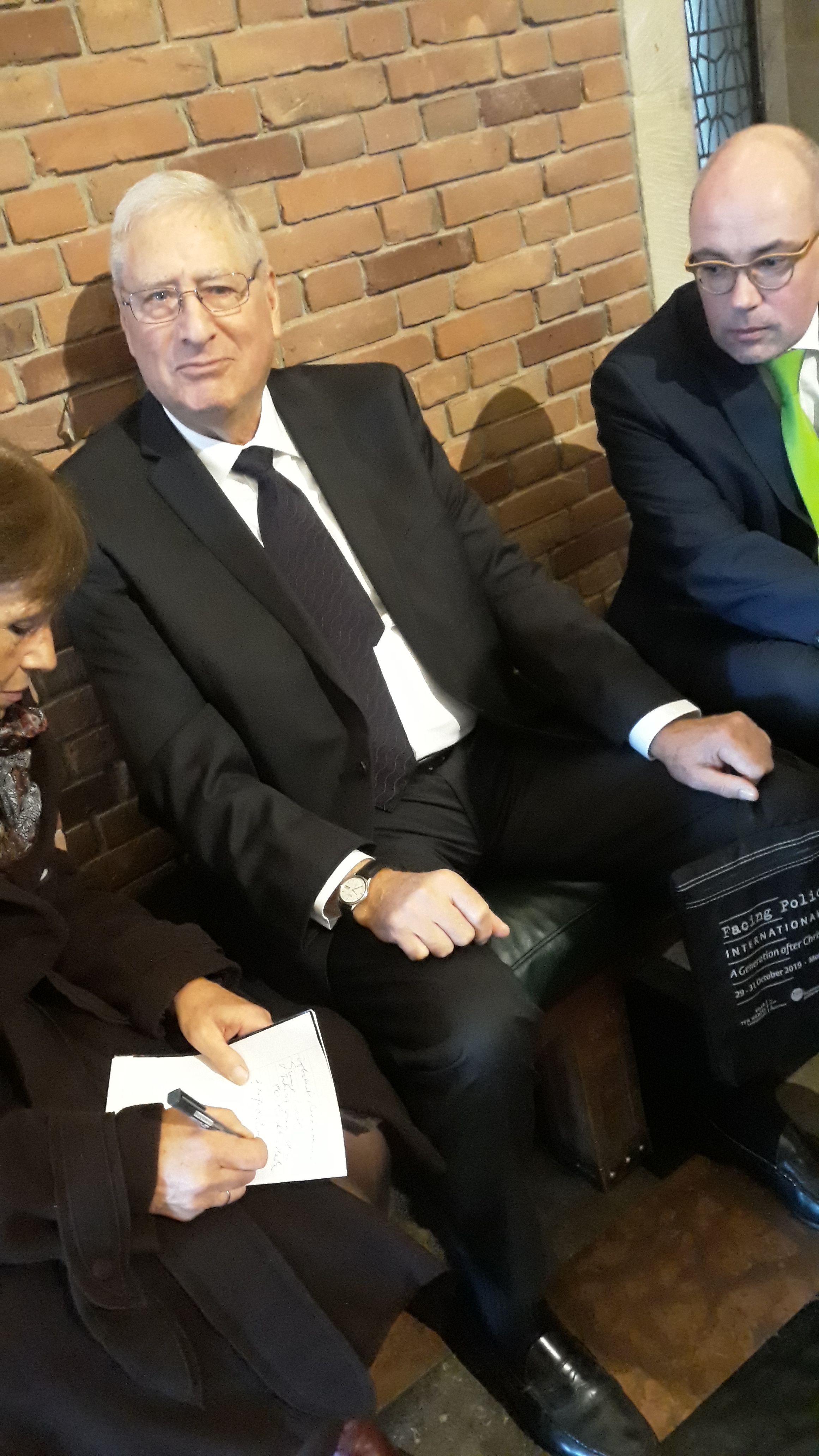 Der amerikanische Historiker Christopher Browning im Friedenssaal des Historischen Rathauses von Münster.